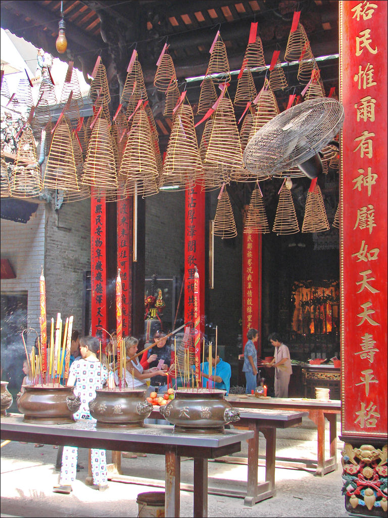 Offrandes devant l'autel de la Déesse Thiên Hâu Thiên Hậu (appelée aussi Mazu) est une divinité traditionnelle chinoise, vénérée dans les provinces maritimes du sud de la Chine (Canton,..) et dans les communautés chinoises expatriées, comme ici à Hô Chi Minh-vville, l'ancienne Saïgon. (extrait de l'article Wikipedia). On trouve des temples semblables à Hoi An (Vietnam). voir aussi : C'est une Déesse-mère (Dame de la mer, Dame céleste,..), protectrice des marins mais elle est également priée par les femmes en particulier pour avoir des enfants. Les prières qui lui sont faites peuvent être inscrites sur des papiers rouges qui sont brulés dans un poële dans la cour du temple pour que la fumée emporte les requêtes jusqu'à elle. Les offrandes à la Déesse sont de divers types : bâtons et spirales d'encens, fruits, argent,. Selon les croyances populaires, des âmes errantes se trouvent aussi dans le temple, ce sont celles des morts qui ne reçoivent pas de culte ou celles de damnés, ces âmes peuvent être dangereuses pour les vivants, il faut donc tenter de les satisfaire, en leur faisant des offrandes et en leur rendant un culte particulier. Le temple taoïste Thien Hâu a été construit au début du XIXe siècle (1827), il est situé au coeur du quartier chinois de Cholon, près du marché de gros.